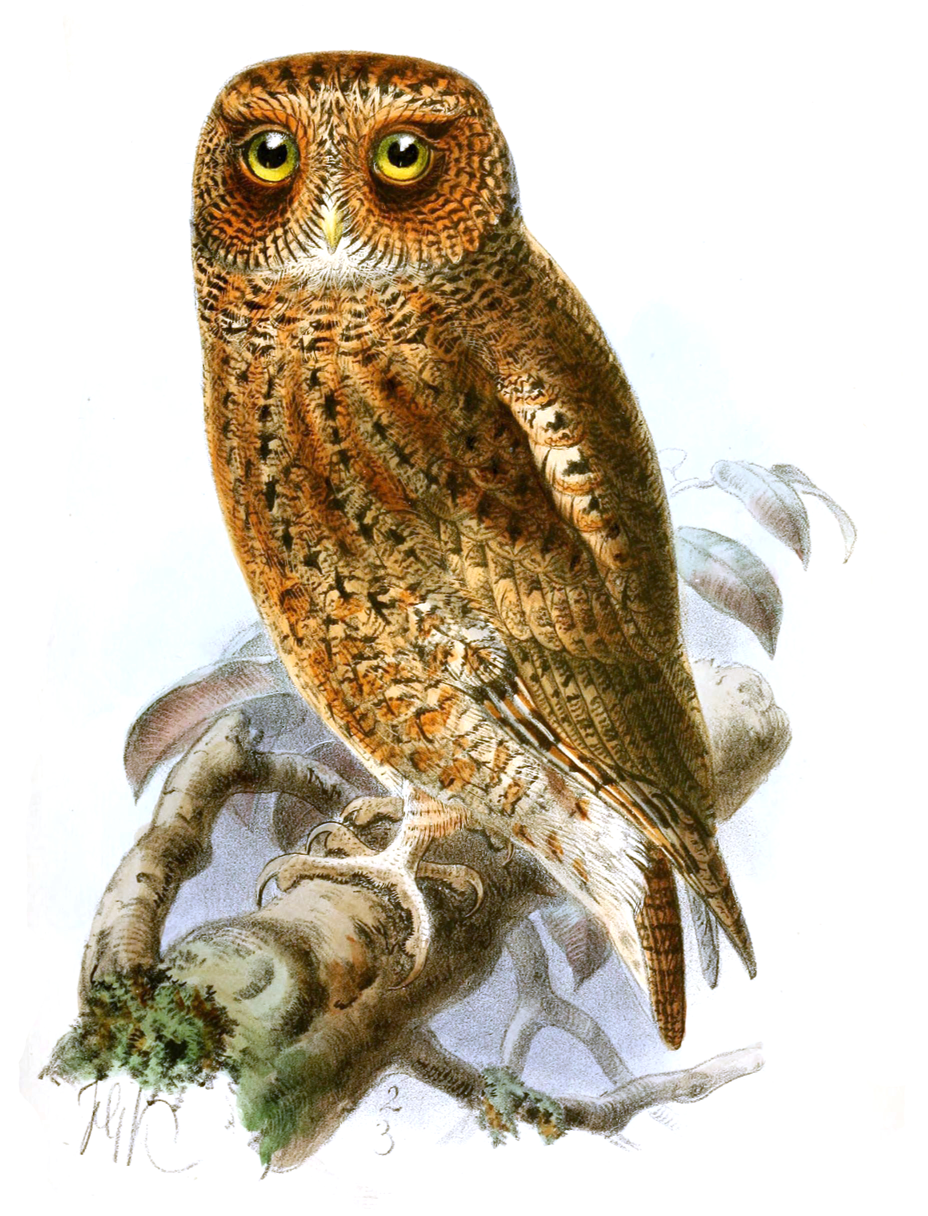 Heteroscops luciae = Otus spilocephalus luciae